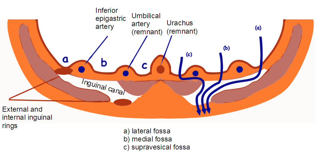 Immagine elaborata da doc44